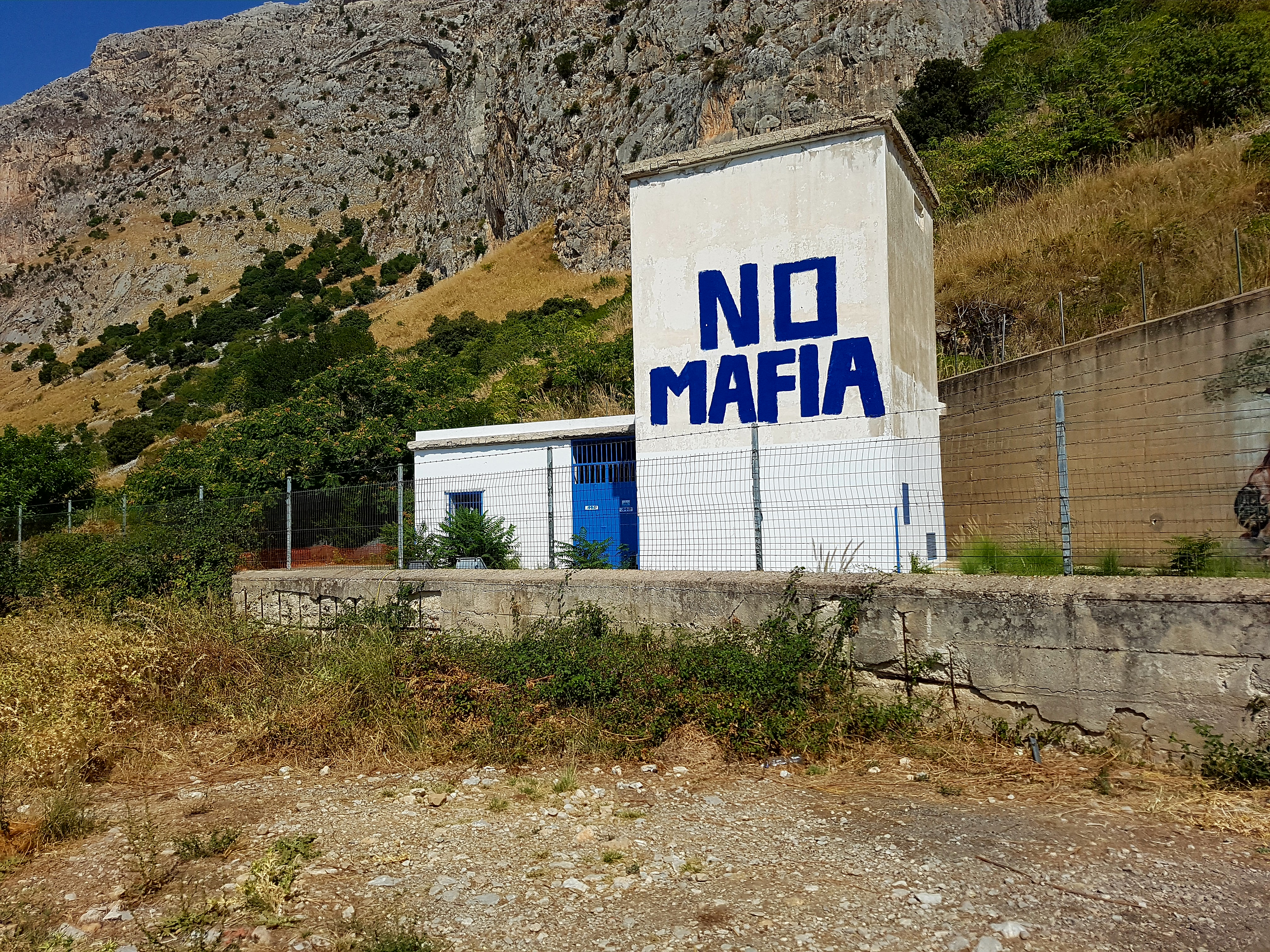 Il luogo dove è stato premuto il telecomando.